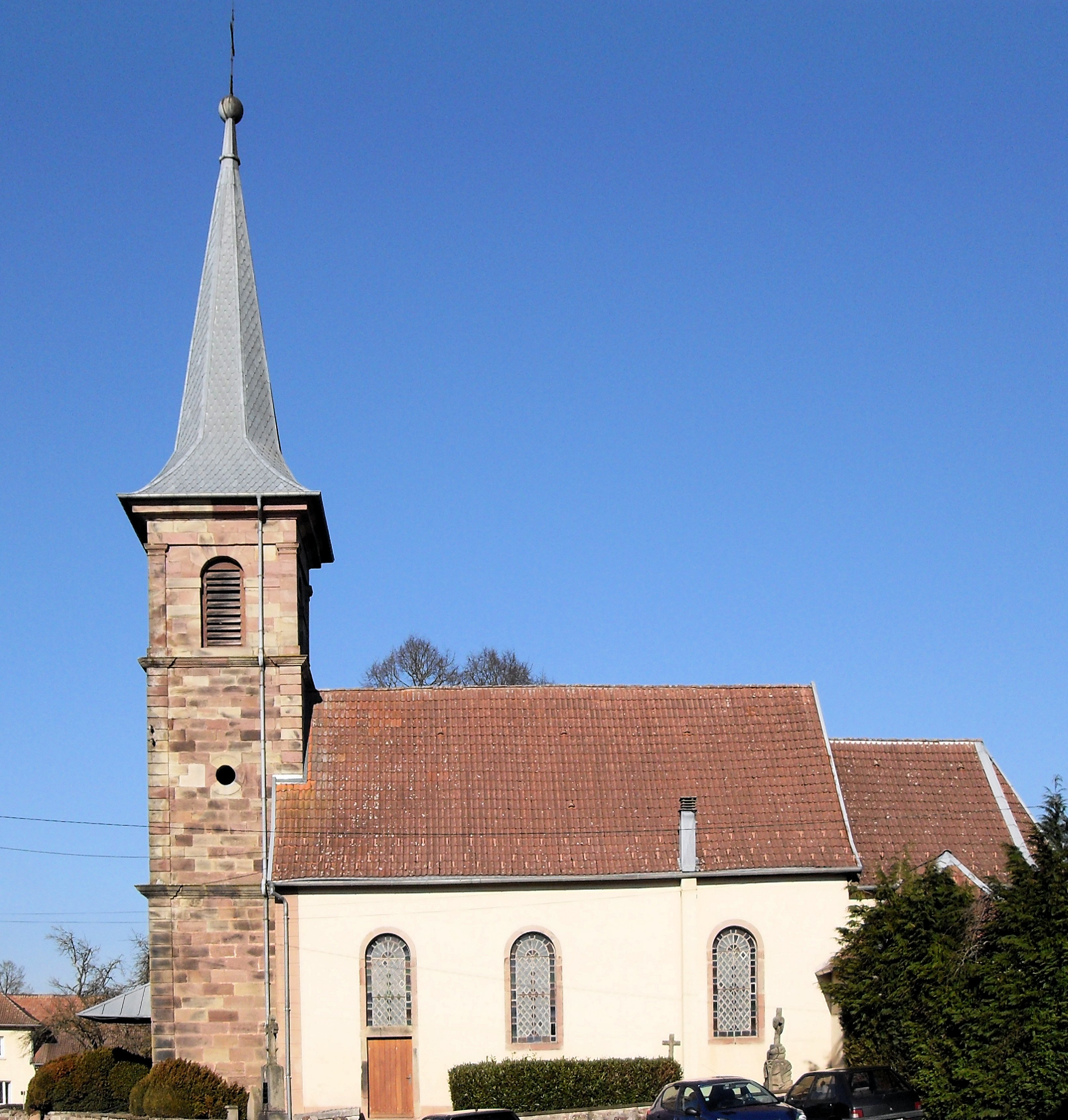 L'église Saint-Antoine à Felon